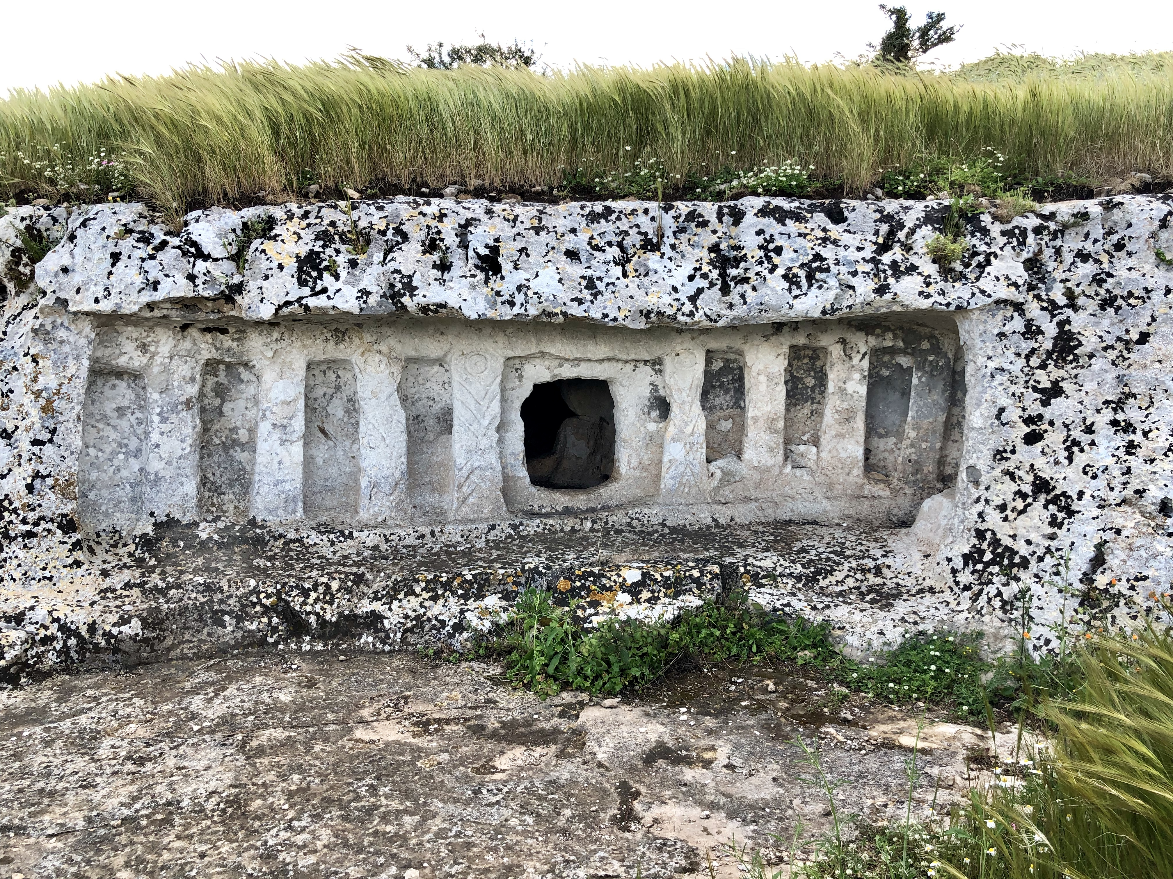 Tomba facies di Castelluccio